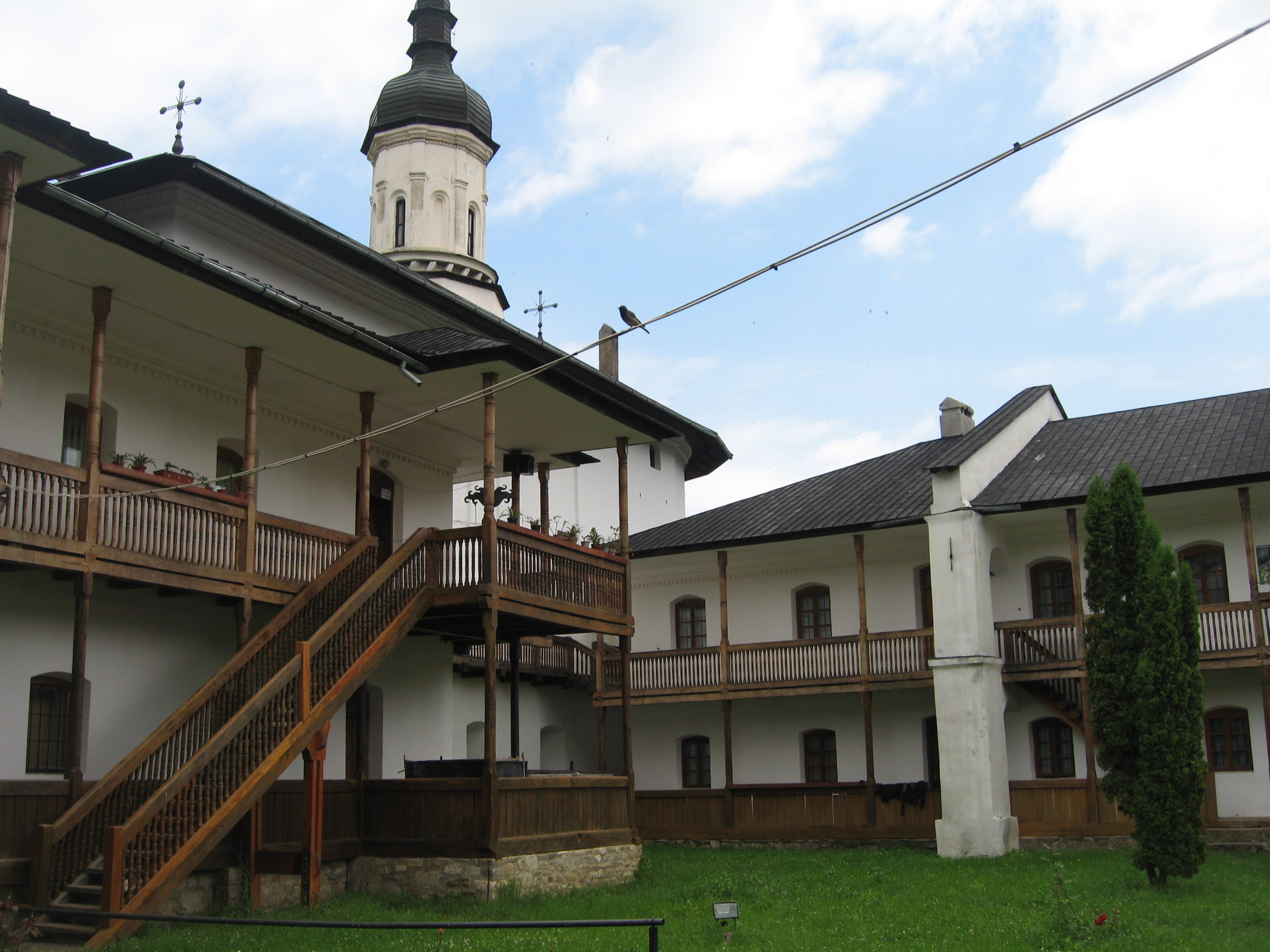 Mănăstirea Secu 02